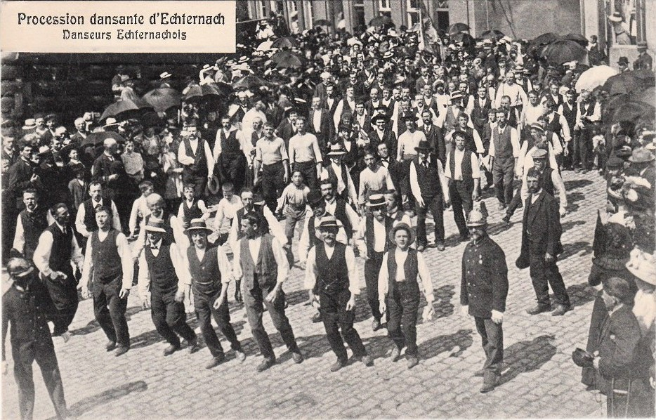 Jacques Marie Bellwald, Procession dansante d'Echternach: Original caption: “Danseurs echternachois. ”